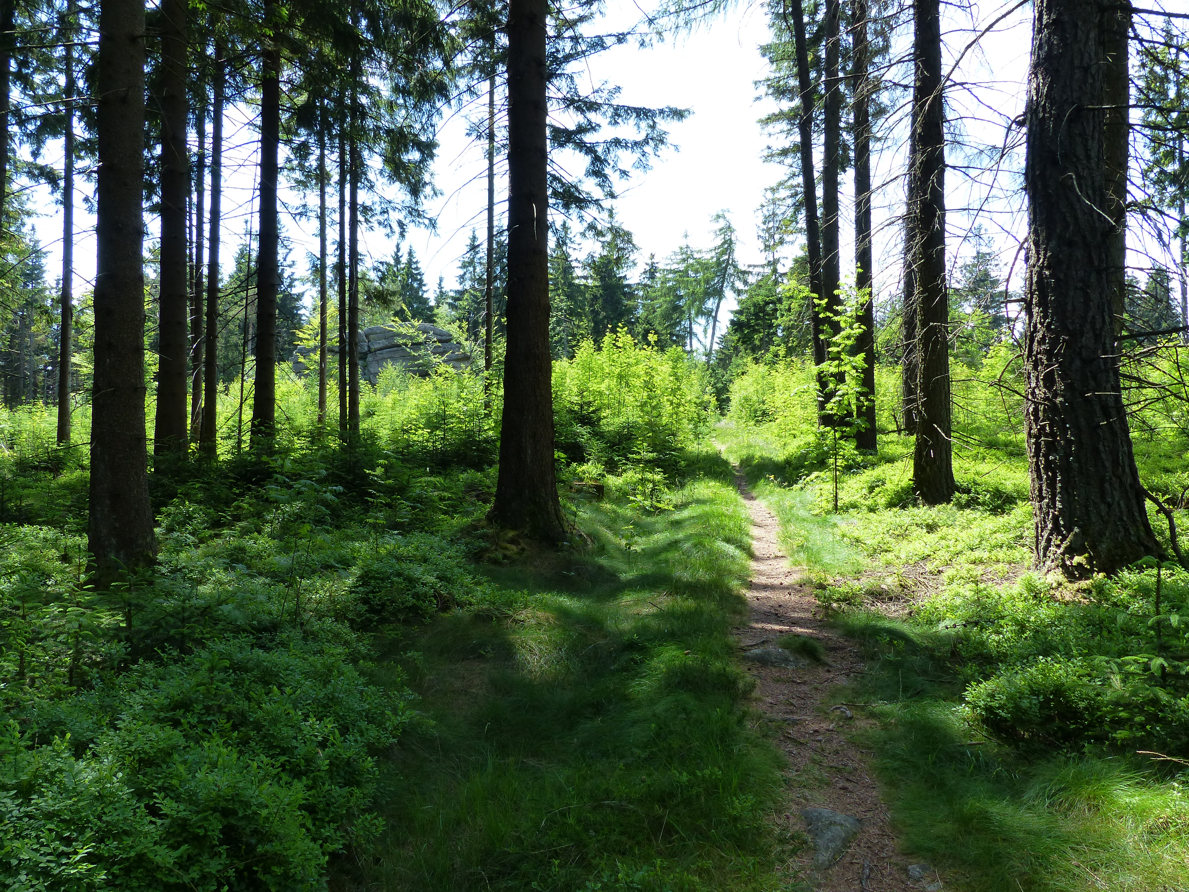 Zellerfels, Geotop am Großen Waldstein im Fichtelgebirge